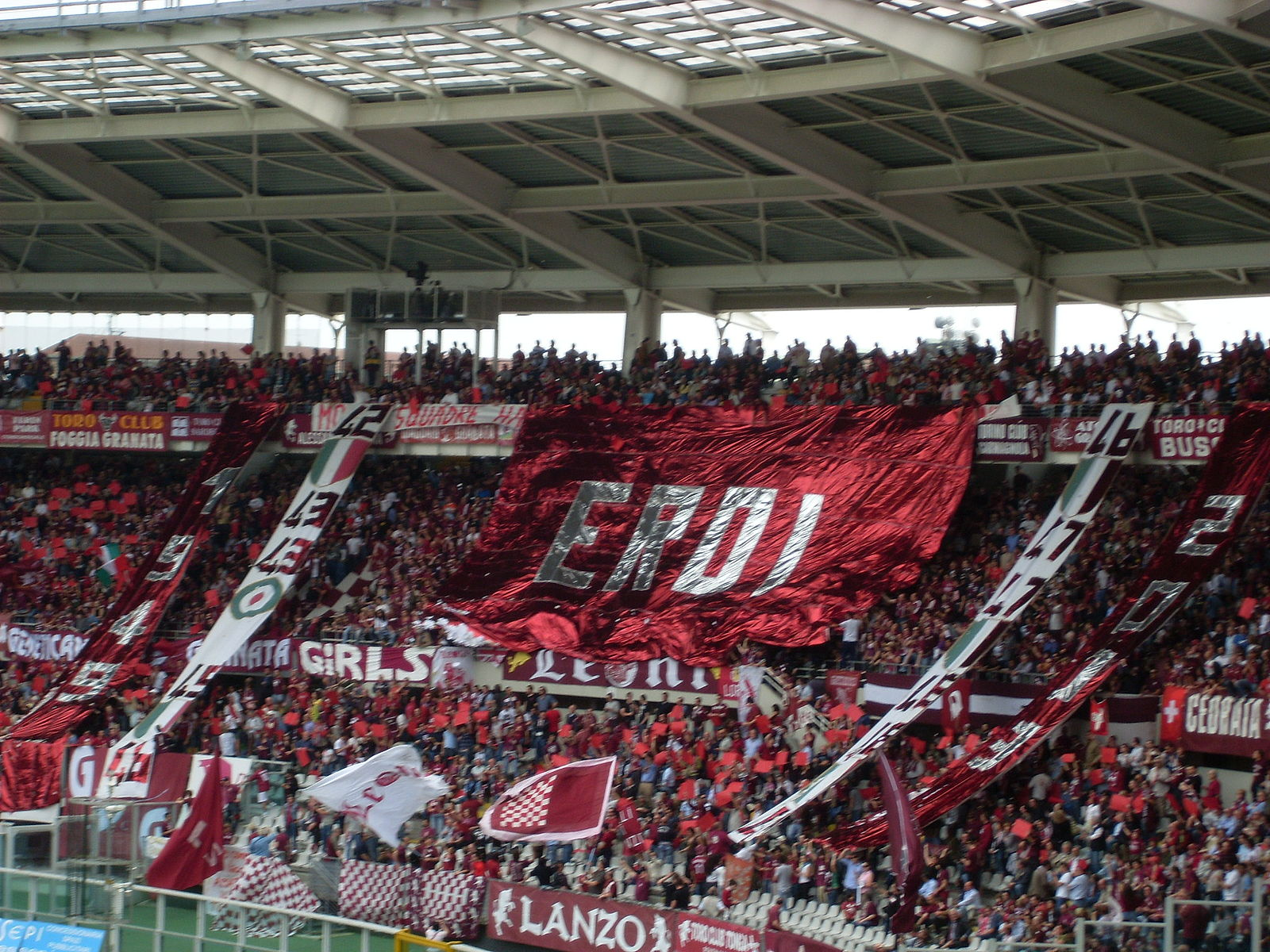 Curva "Primavera" della squadra Torino F.c.